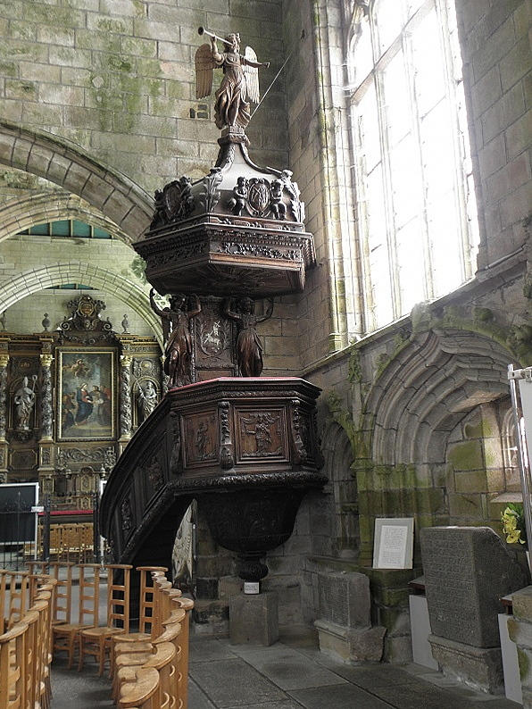 Chaire à prêcher sise en la chapelle N.D. du Kresiker de Saint-Pol-de-Léon (29) et provenant de la cathédrale Saint-Paul-Aurélien.